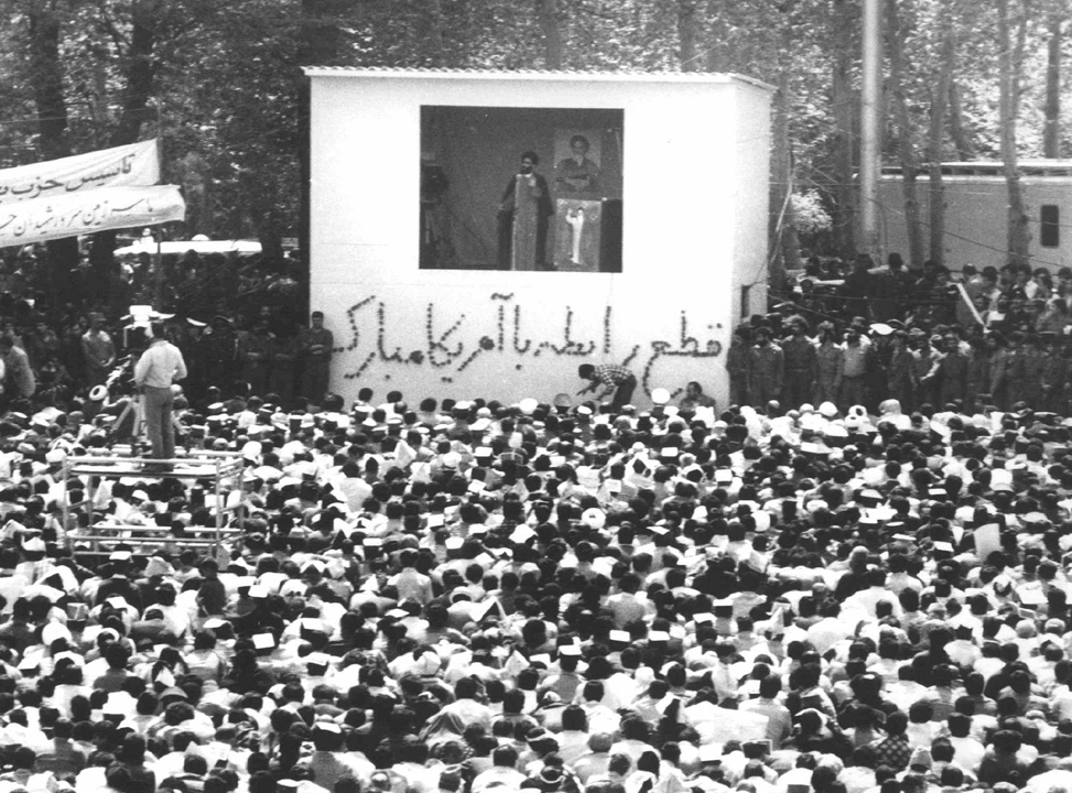 نماز جمعه تهران، دانشگاه تهران، سید علی خامنه‌ای در حال ایراد خطبه، اردی‌بهشت ۱۳۵۹